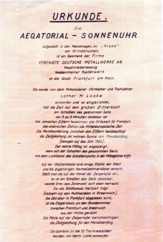 Äquatorialsonnenuhr in Frankfurt am Main Schenkungsurkunde an die Stadt Frankfurt